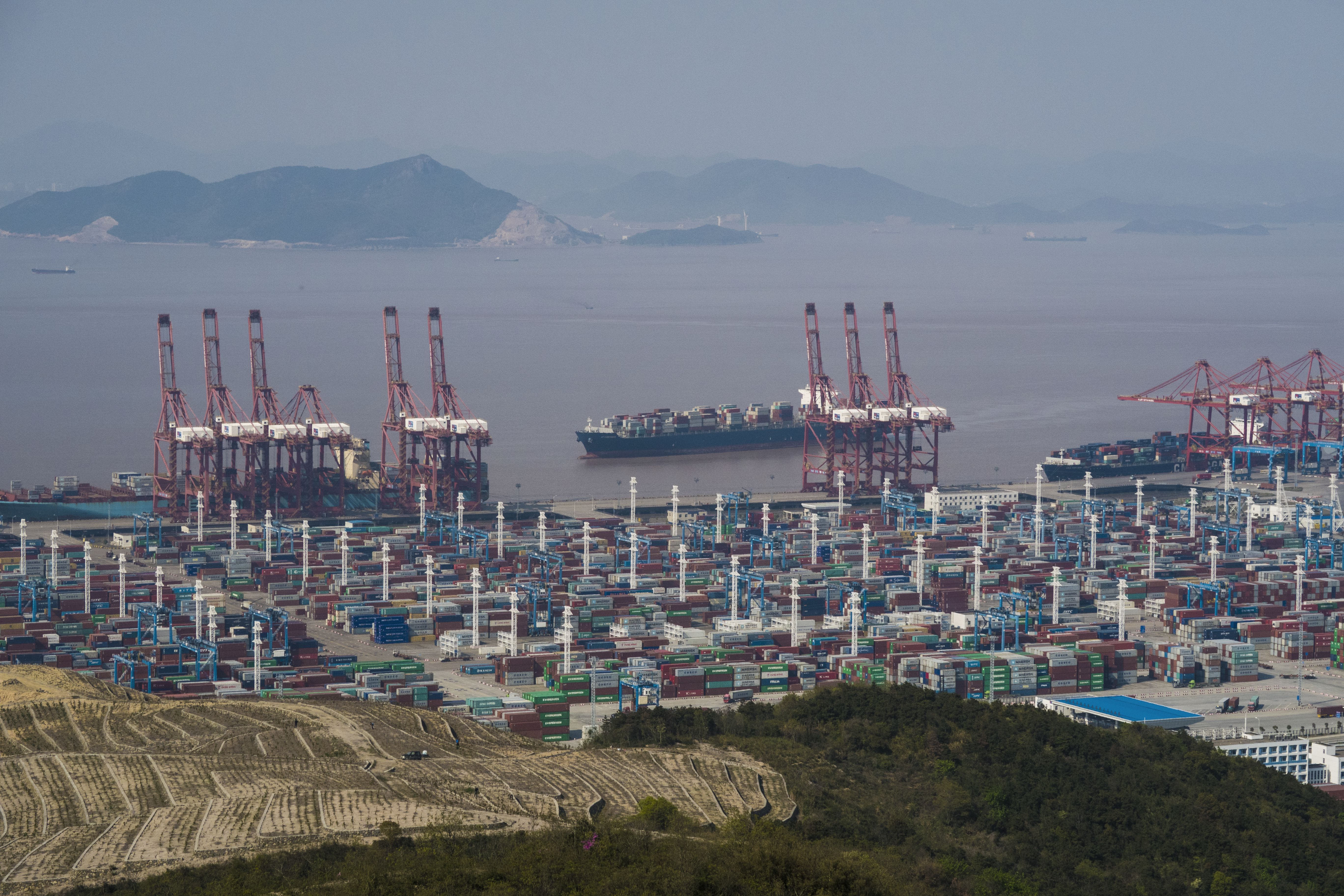 宁波港穿山港区4期泊位